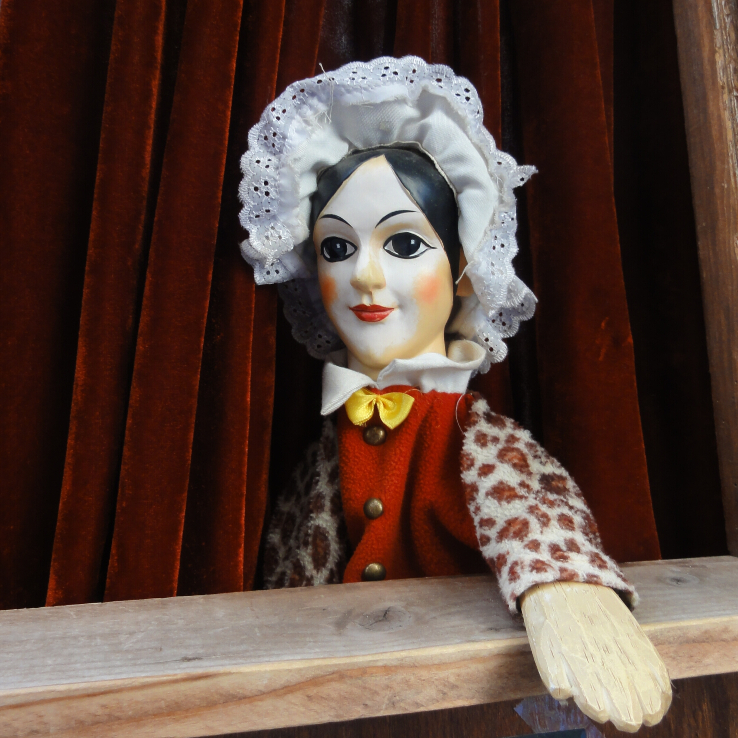 Madelon, du théâtre de Guignol